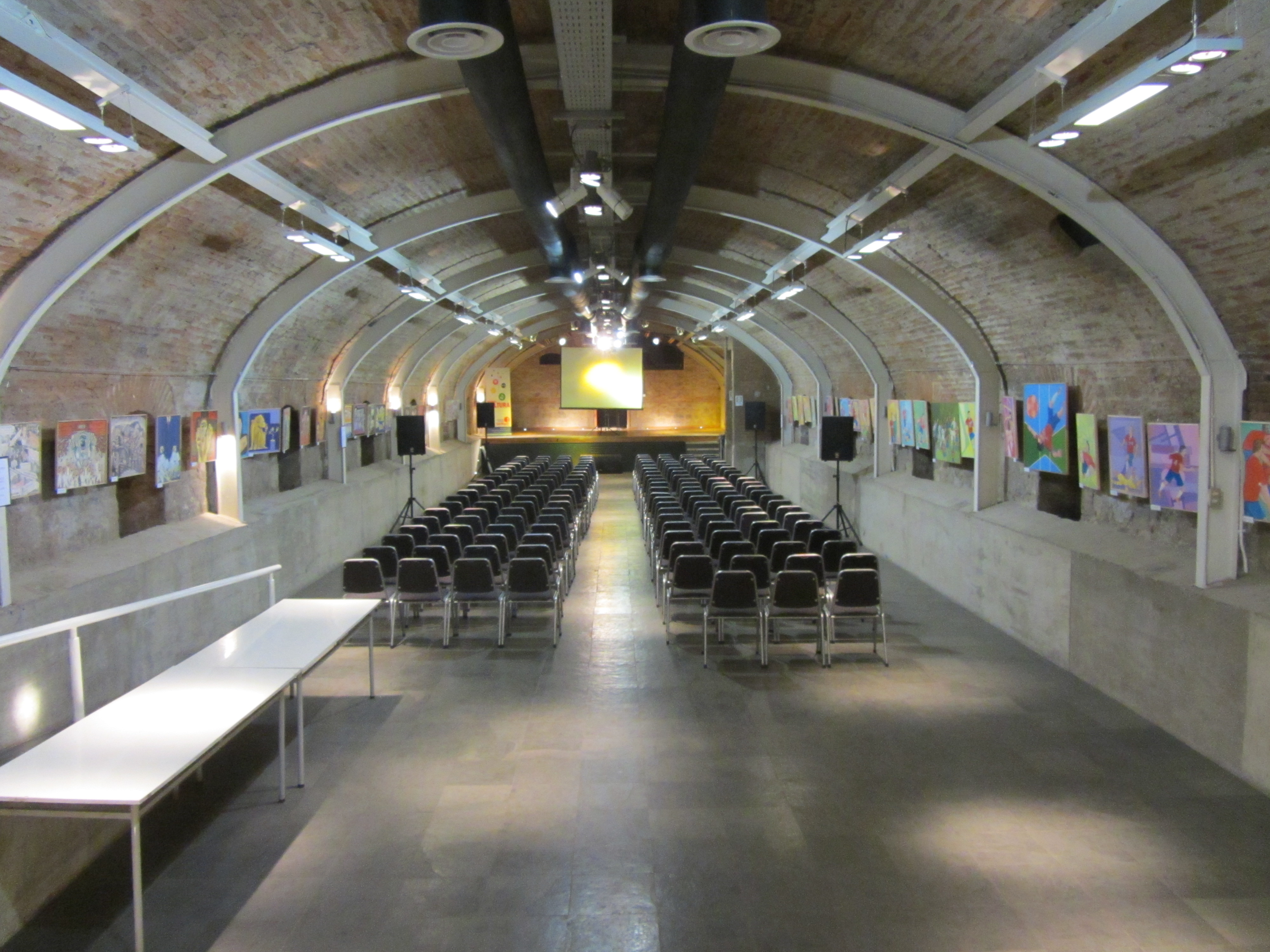 Sala Fray Pedro Subercaseaux, Casa de la Cultura de San Miguel